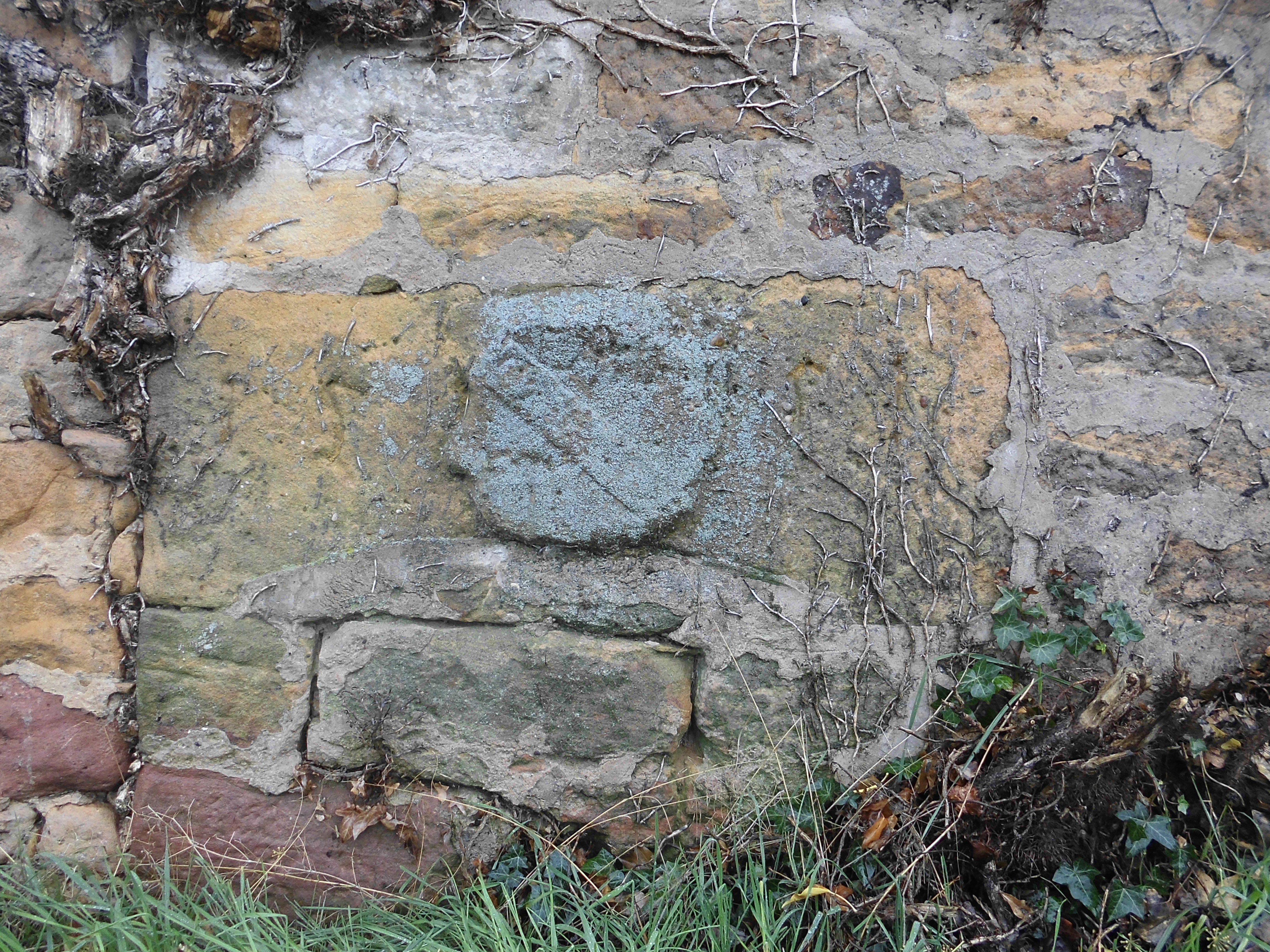 Mauer in der Weinlage Deidesheimer Kalkofen